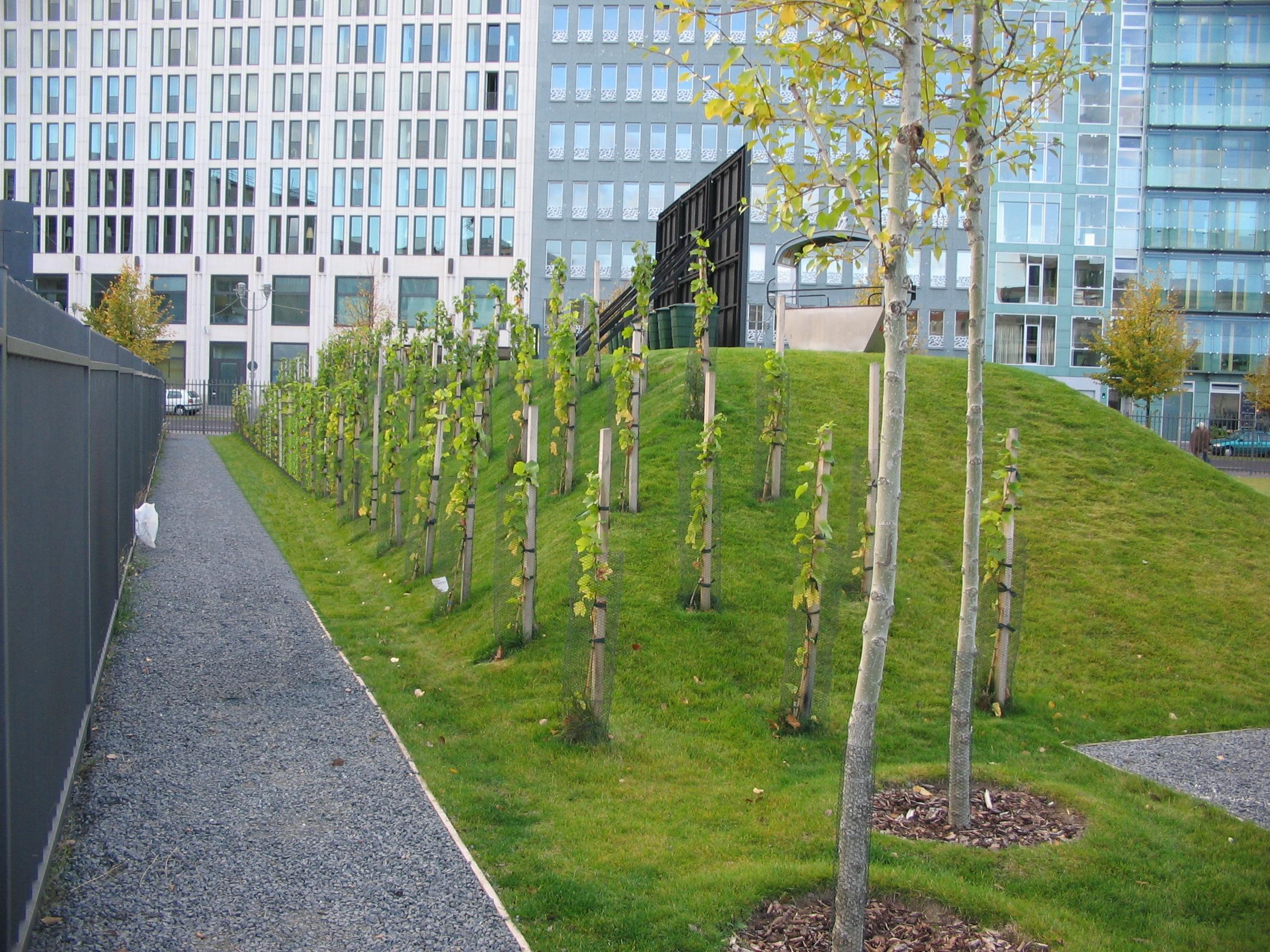 Weinberg auf dem Gartengelände neben der Hessischen Landesvertretung in Berlin-Mitte, In den Ministergärten. Der Weinberg liegt an der südlichen Umzäunung auf einem sonnenzugewandten Südhang. Die hier zu sehende Pfahlerziehung ist typisch für das Weinanbaugebiet Mosel, nicht aber für Hessen